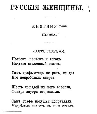 "Отечественные записки", 1872, 4 (поэма "Русские женщины")